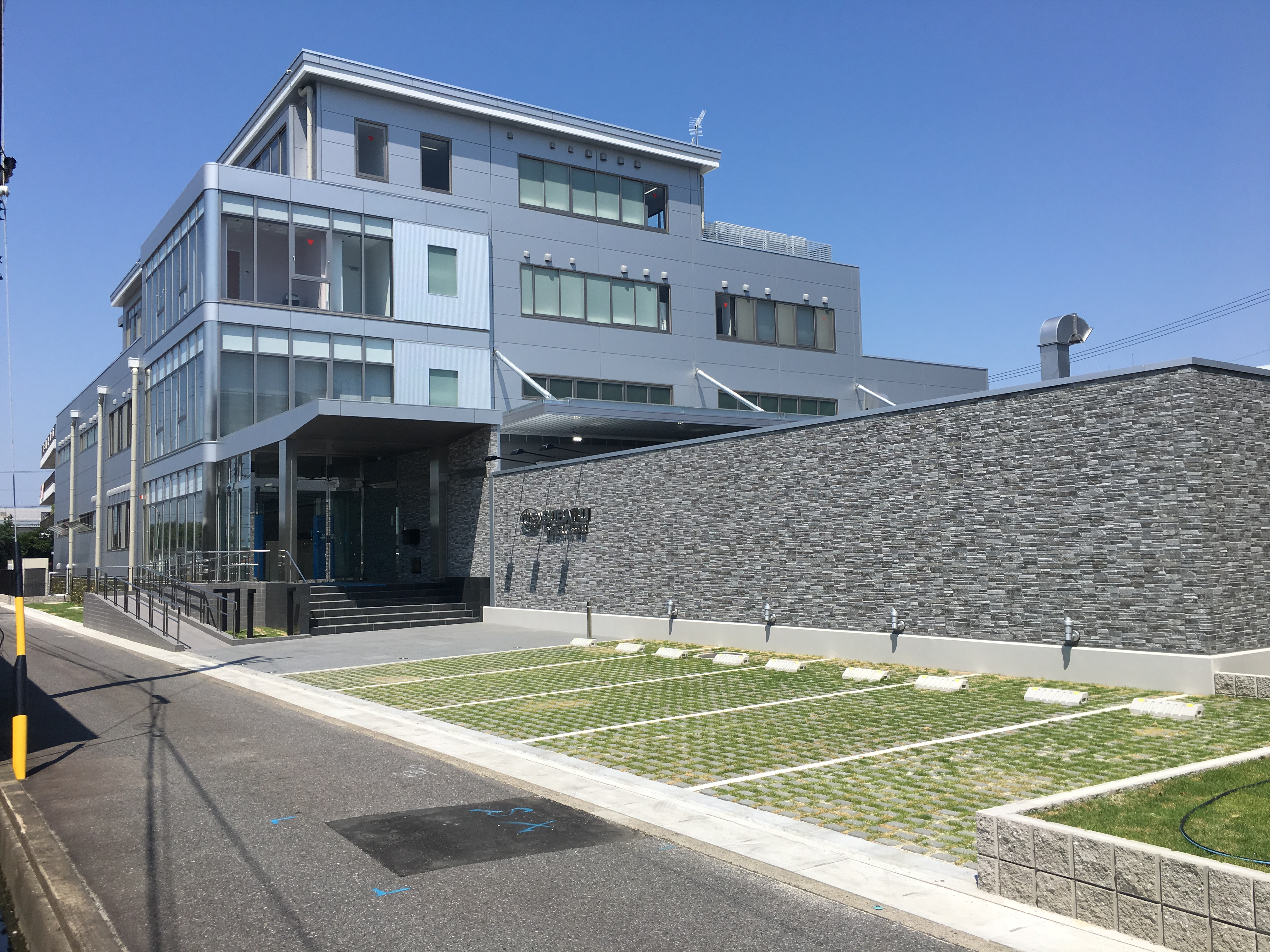 名古屋スバル自動車株式会社 本社社屋